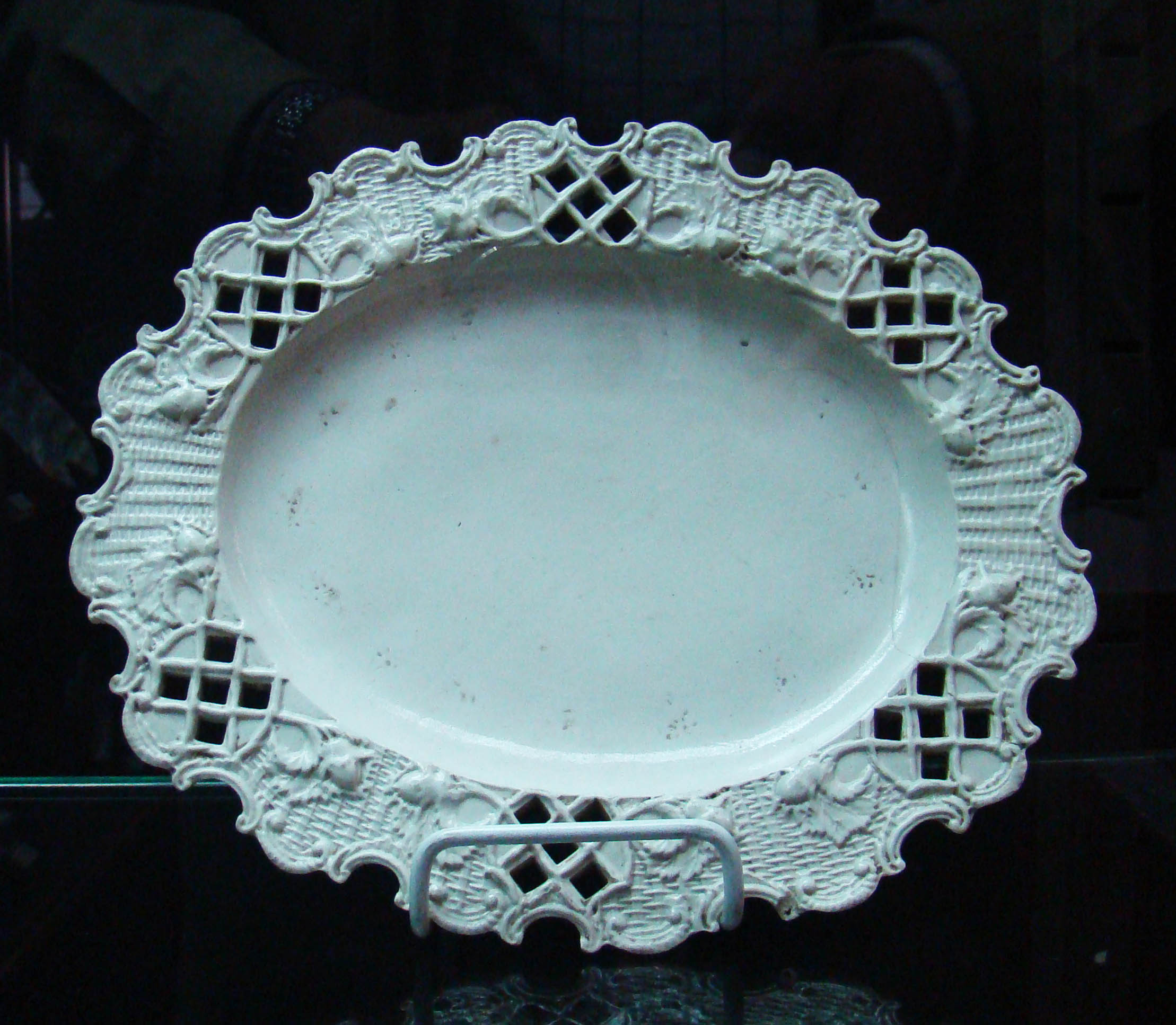 Fuente de cerámica de Alcora (Valencia).Museo de Valladolid en el palacio de Fabio Nelli.